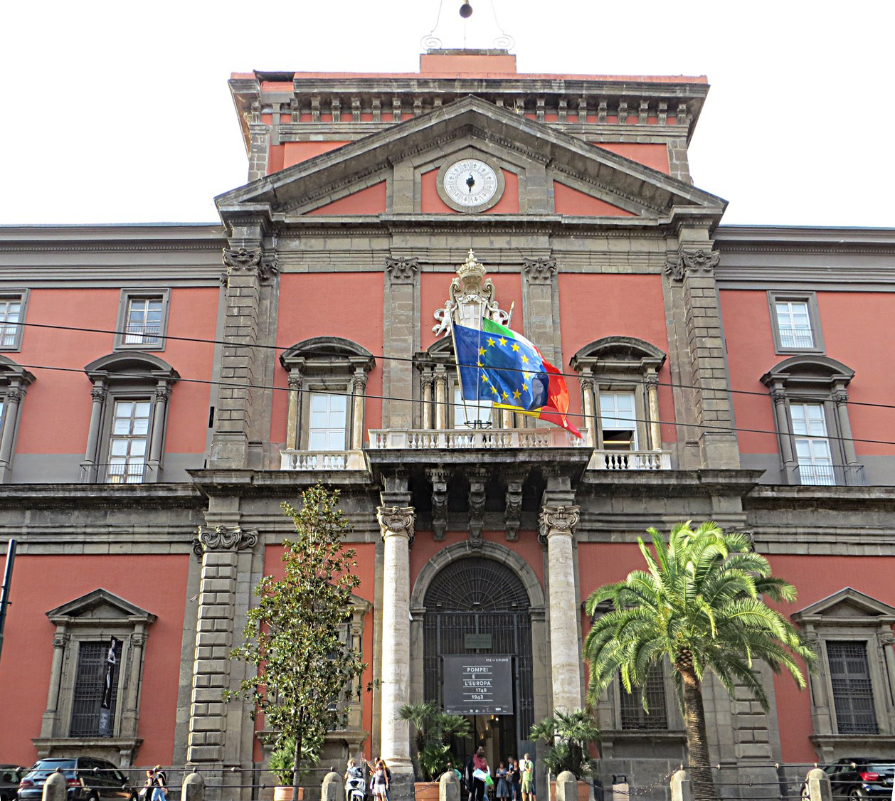 Museo Archeologico Nazionale di Napoli